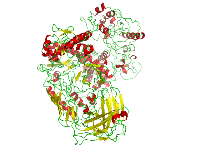 STRUCTURE OF TAQ DNA POLYMERASE